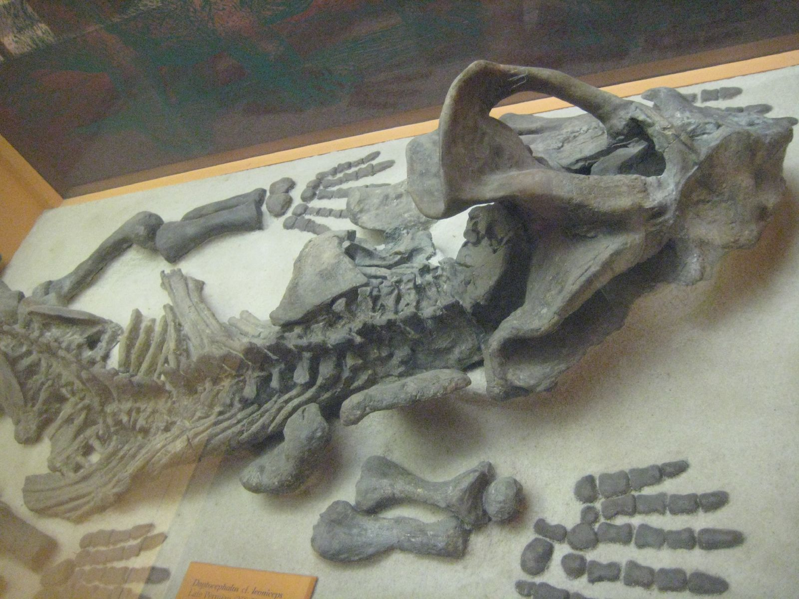 Dicynodon cf. D. leoniceps (synonym: (Daptocephalus); Late Permian (250 - 230 mya)